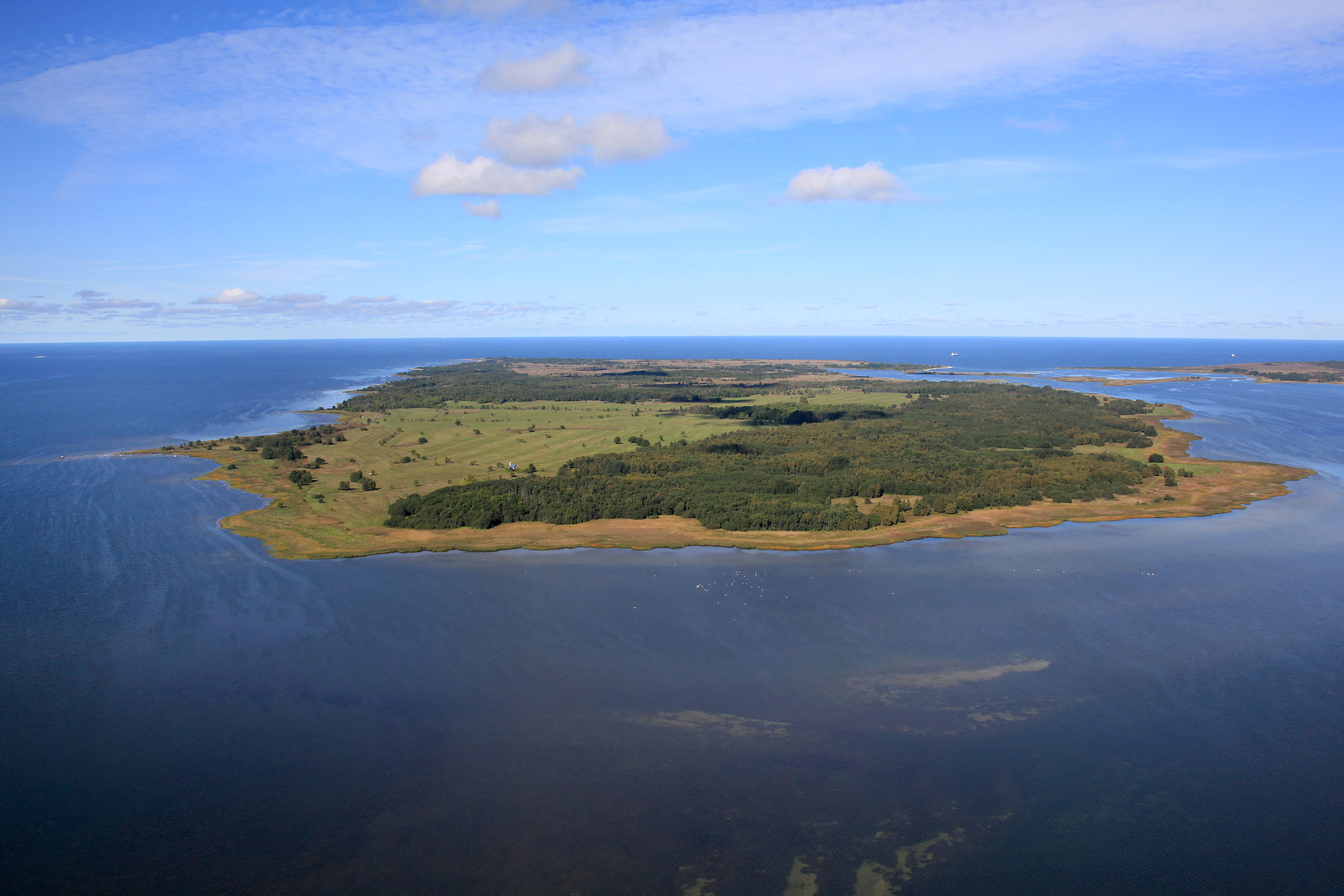 Suur-Pakri saar